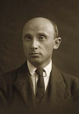 Otakar Kubín (1883 - 1969), Český malíř, sochař a grafik.